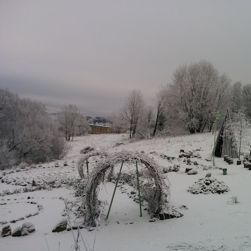 Otepää kivilabürint jaanuaris 2018